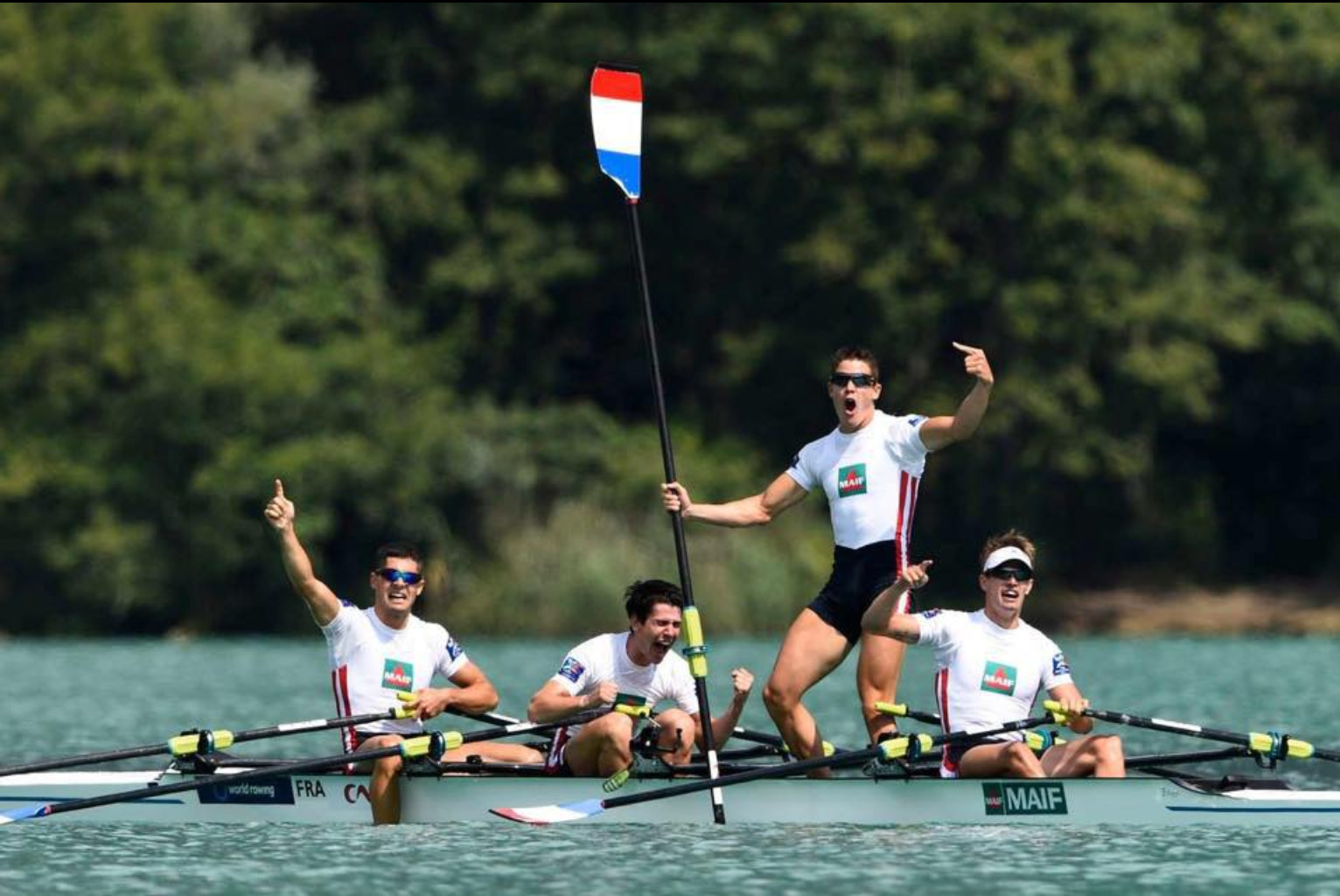 Victoire de l'équipe française à Aiguebelette 2015